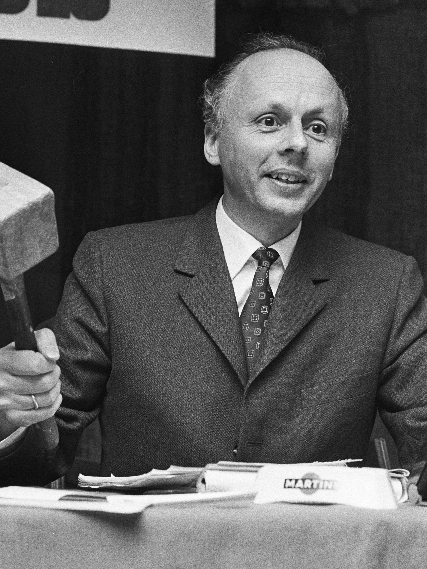 DS'70 bijeen in Den Dolder (Utrecht). Wethouder mr. Van Stuijvenberg van Eindhoven, voorz. DS'70 voor affiche met hamer 4 april 1970